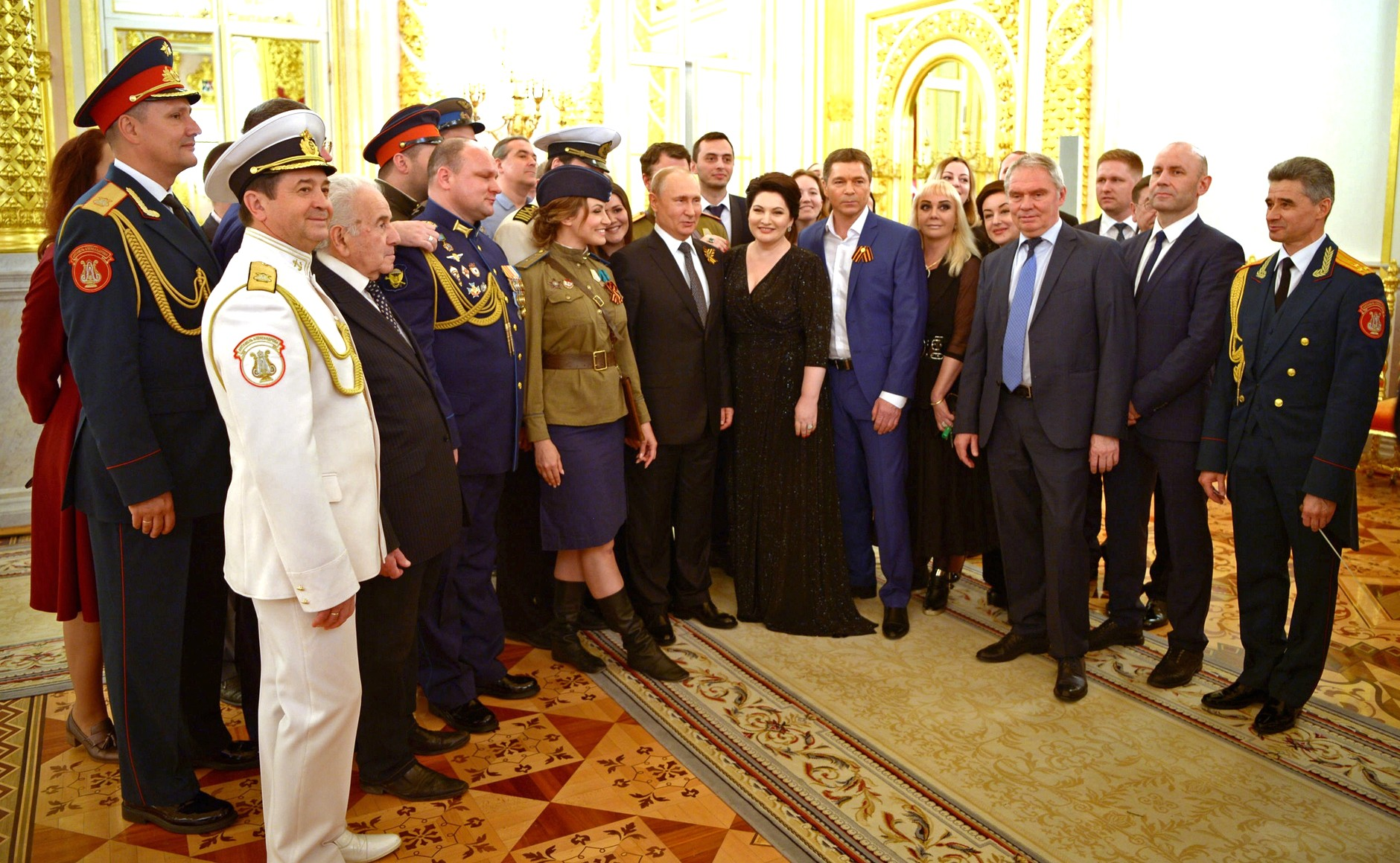 На торжественном приёме в Кремле по случаю 74-й годовщины Победы в Великой Отечественной войне.